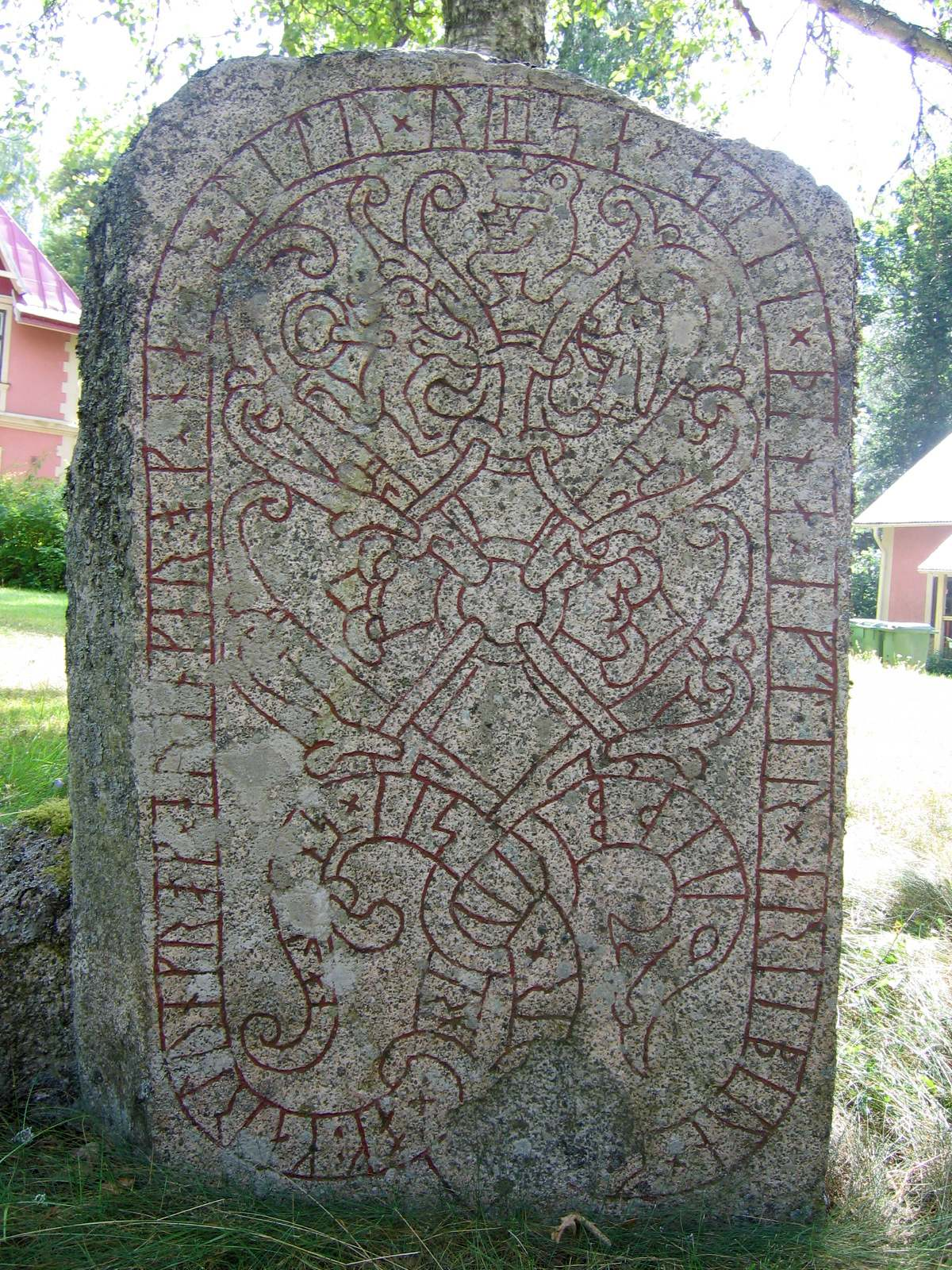 Runestone